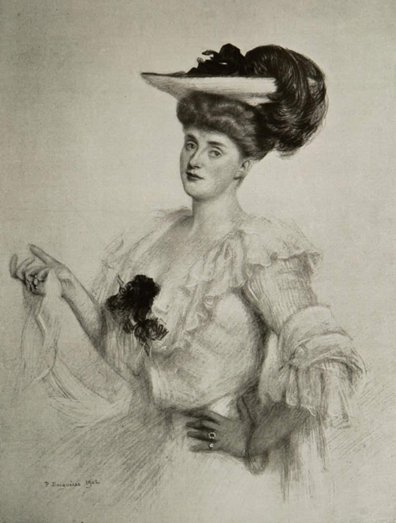 Madame Édouard Goüin, par Paul Baignères - 1902 (Les Modes : revue mensuelle illustrée des Arts décoratifs appliqués à la femme)